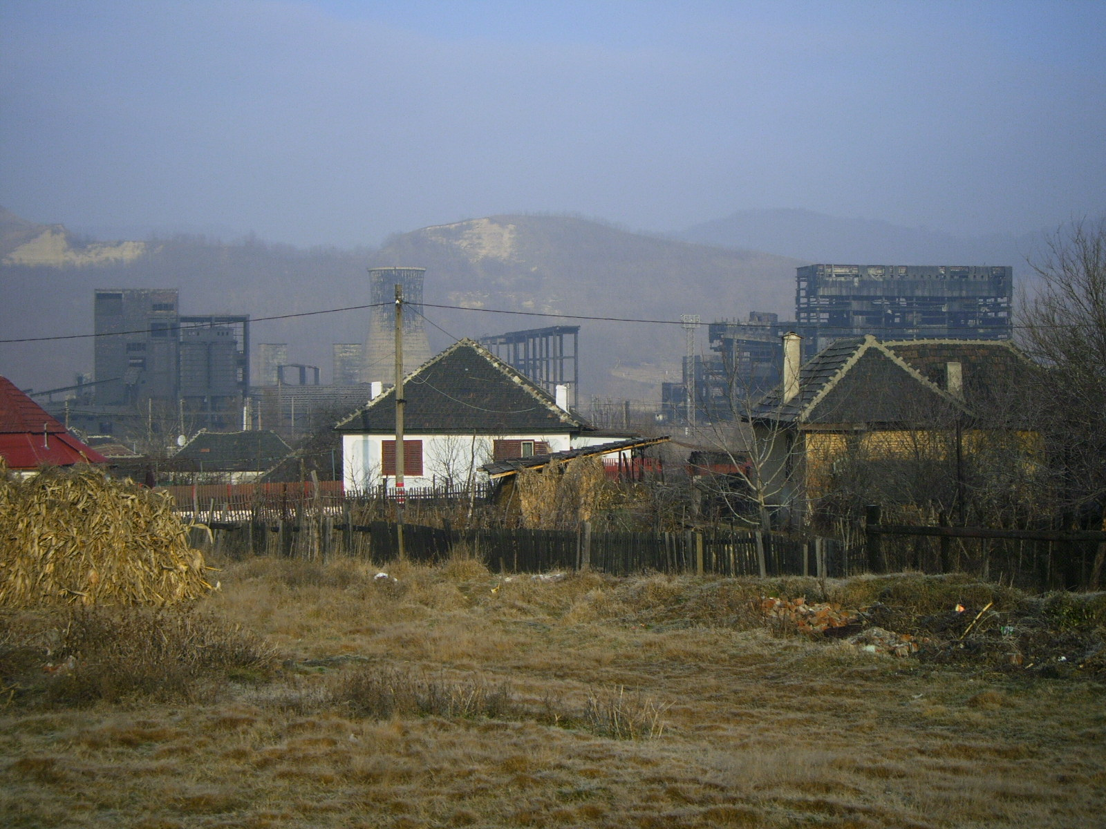 Industriebauten in Copsa Mica (Klein-Kopisch), der sogenannten "Schwarzen Stadt"